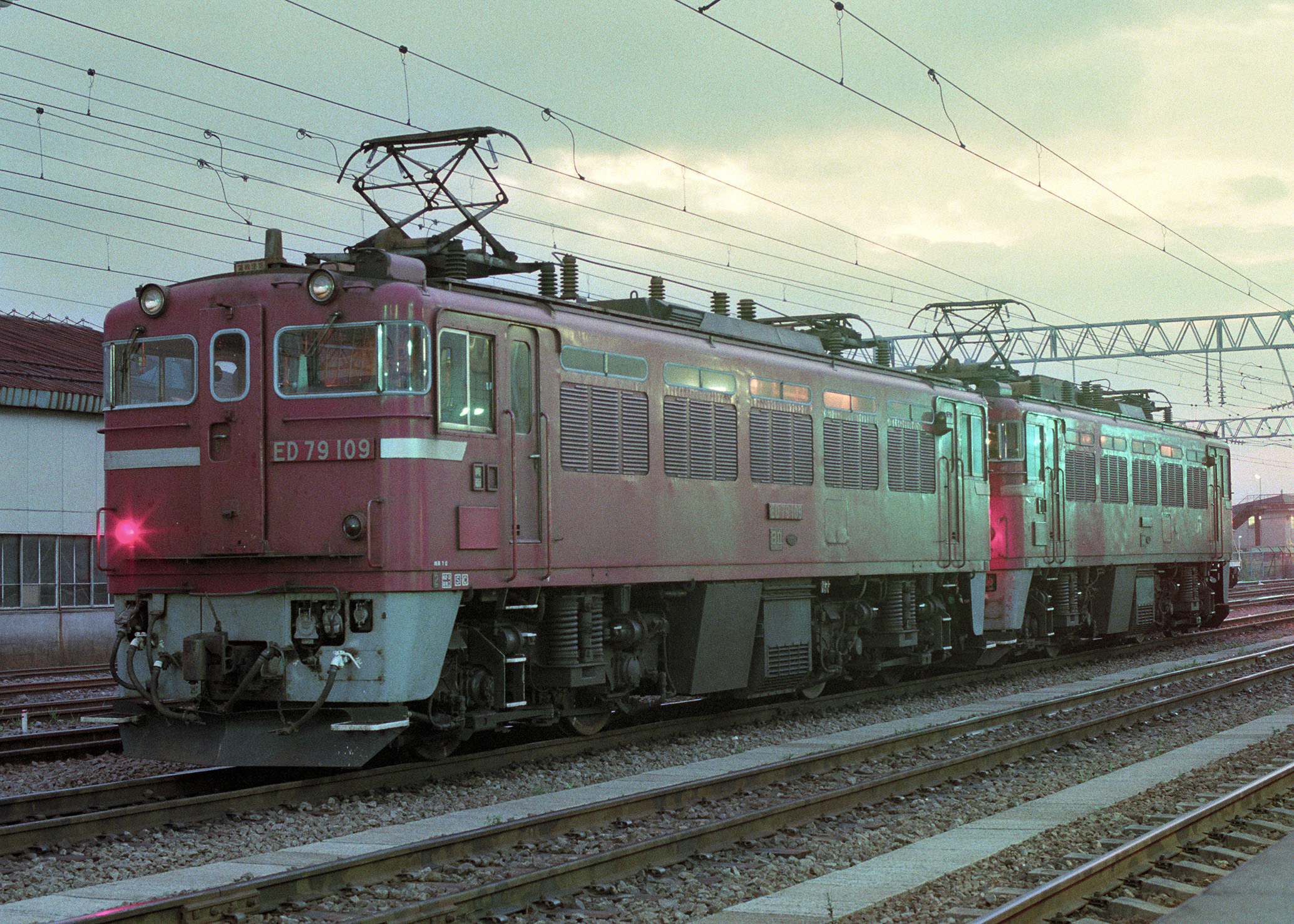 JR北海道 ED79 109+ED79